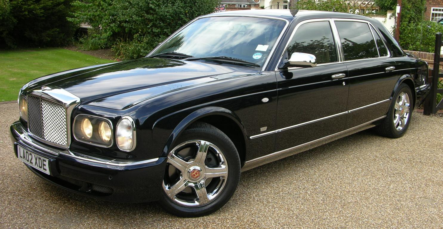 2002 Bentley Arnage Red Label Mulliner LWB